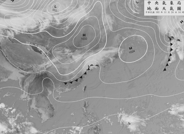 2014.11.24 14:00 台灣附近的地面天氣圖